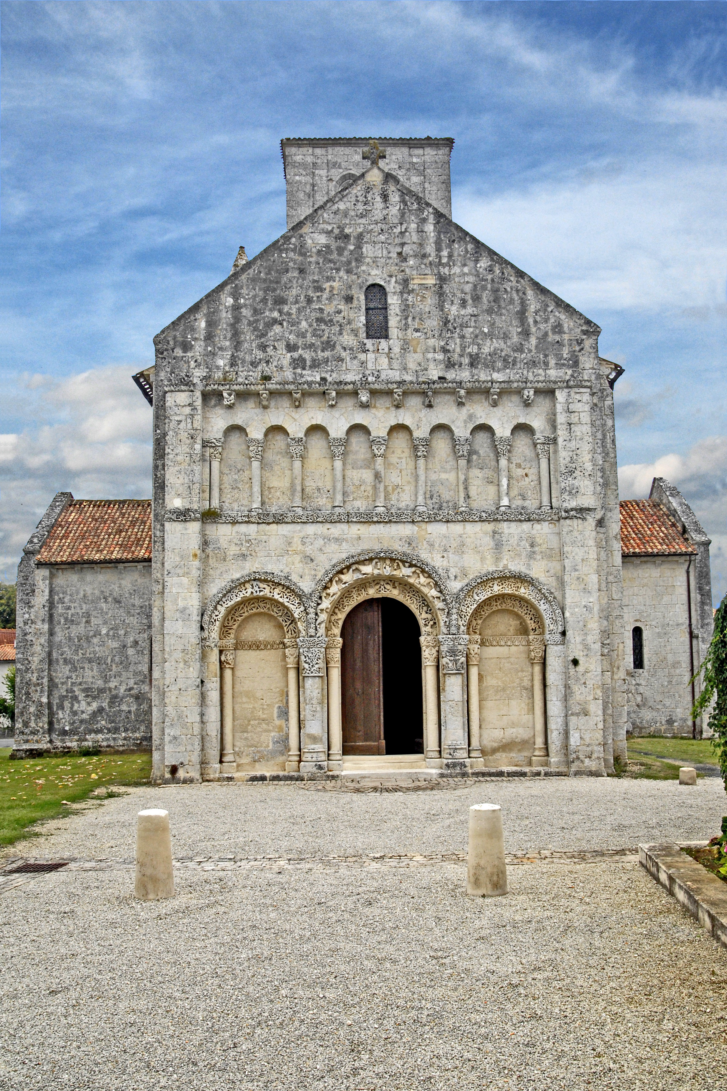 Notre-Dame Corme-Écluse, Fassade ganz nahe